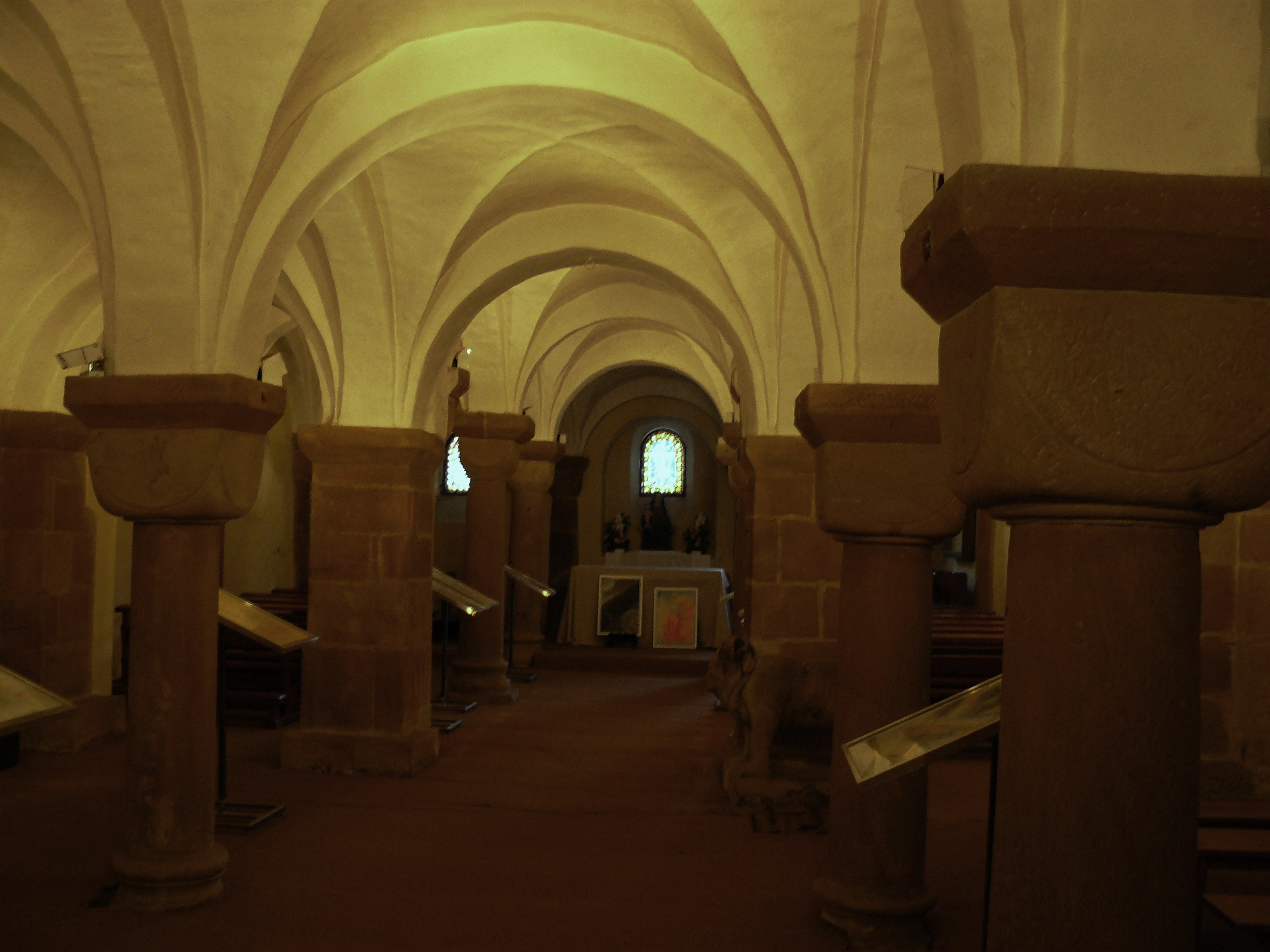 Crypte de l'abbatiale Saint-Pierre-et-Saint-Paul (XIe siècle)